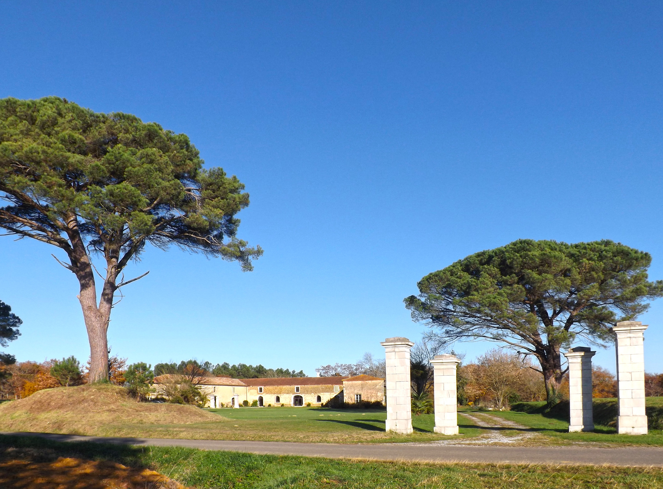 Château de Marpaps, Landes, France